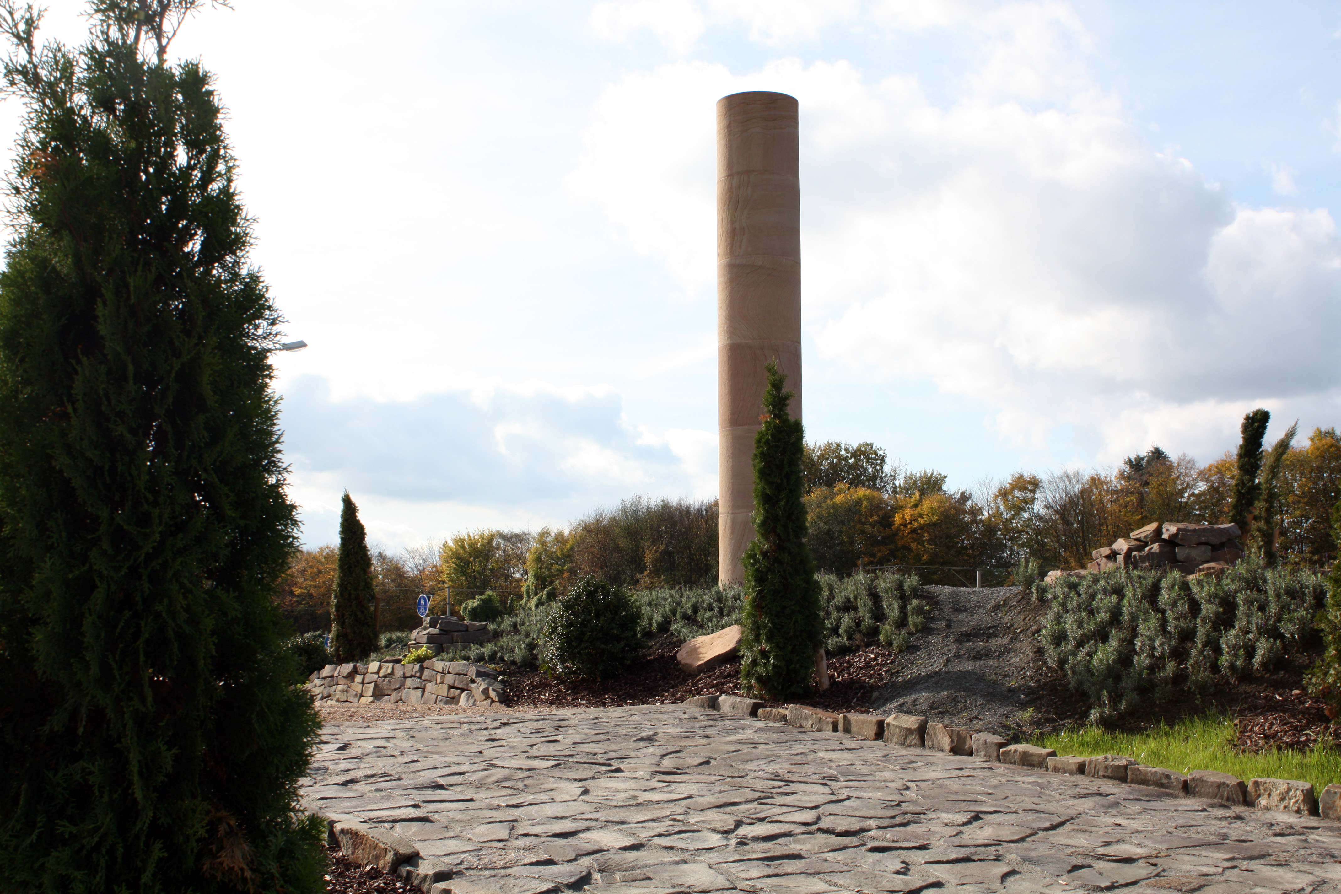 Hürth, Kreisel I, Luxemburger Straße. Stele als nachempfundene Distanzsäule und "römisches Pflaster"